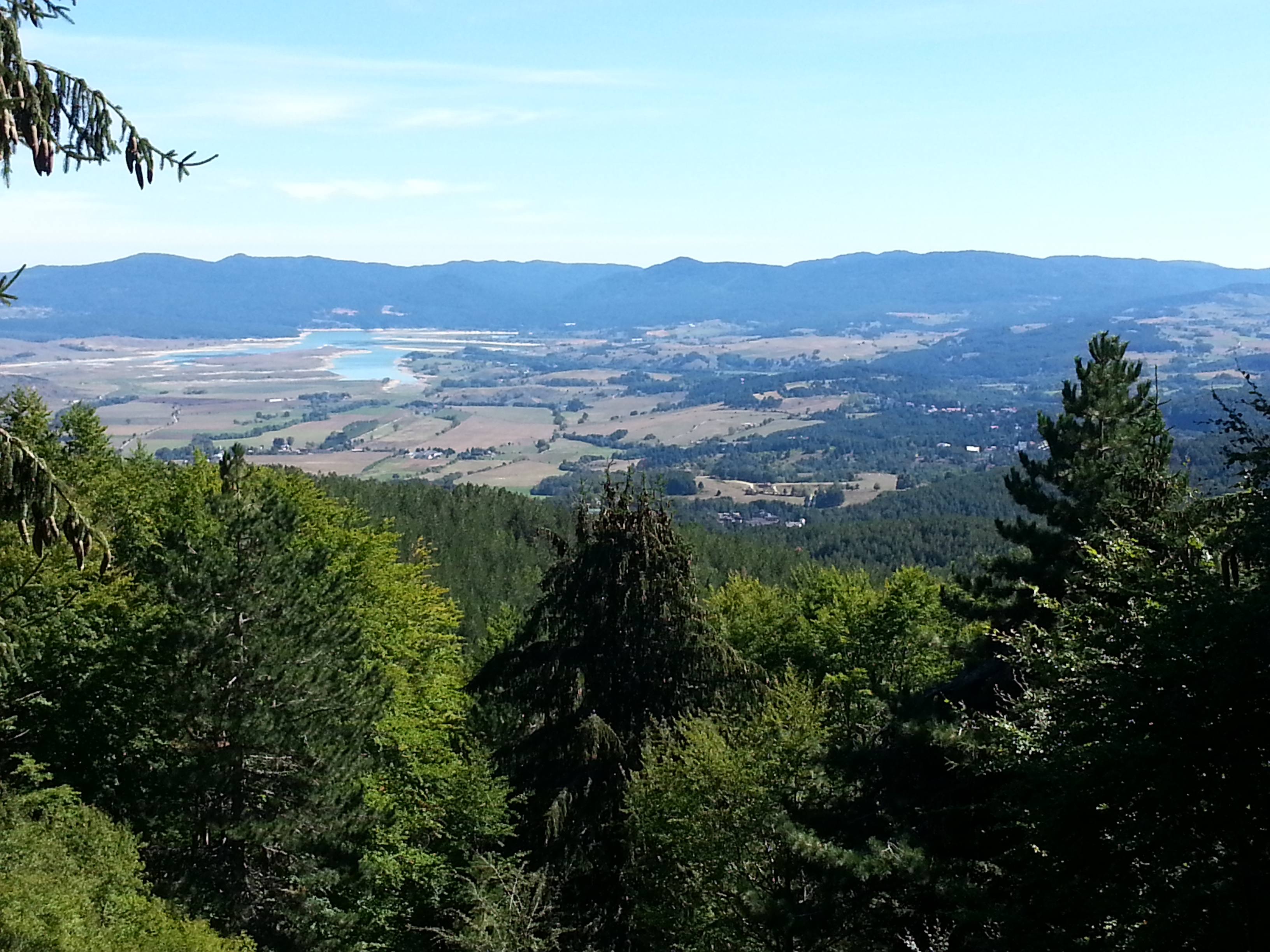 foto scattata nel mese di giugno 2013 dal valico di monte Scuro